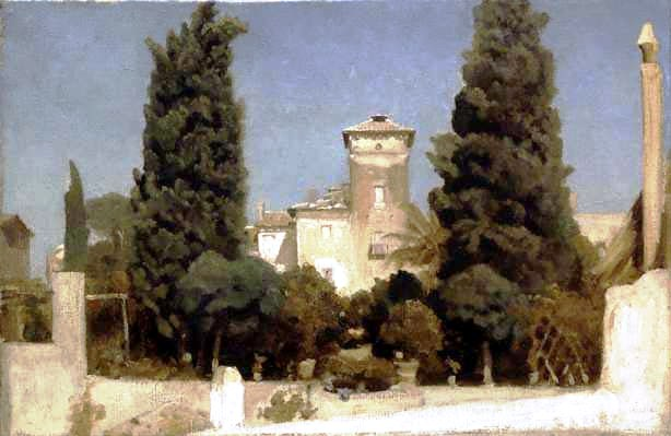 Villa Malta a Roma, di Frederic Leighton, 1860 circa